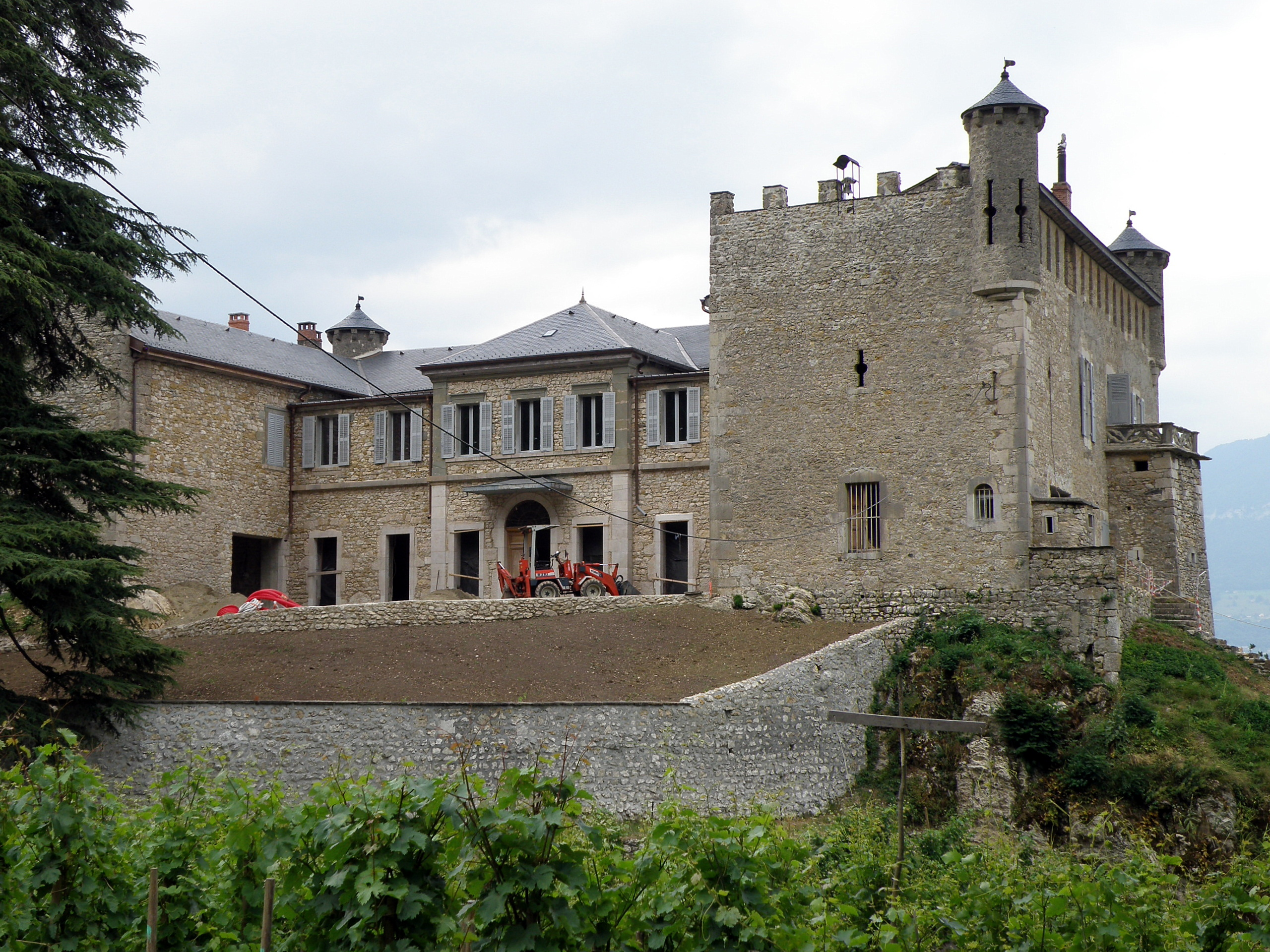 Bourdeau, comm. du département de la Savoie (région Rhône-Alpes, France), sur le bord du lac du Bourget. Château médiéval.